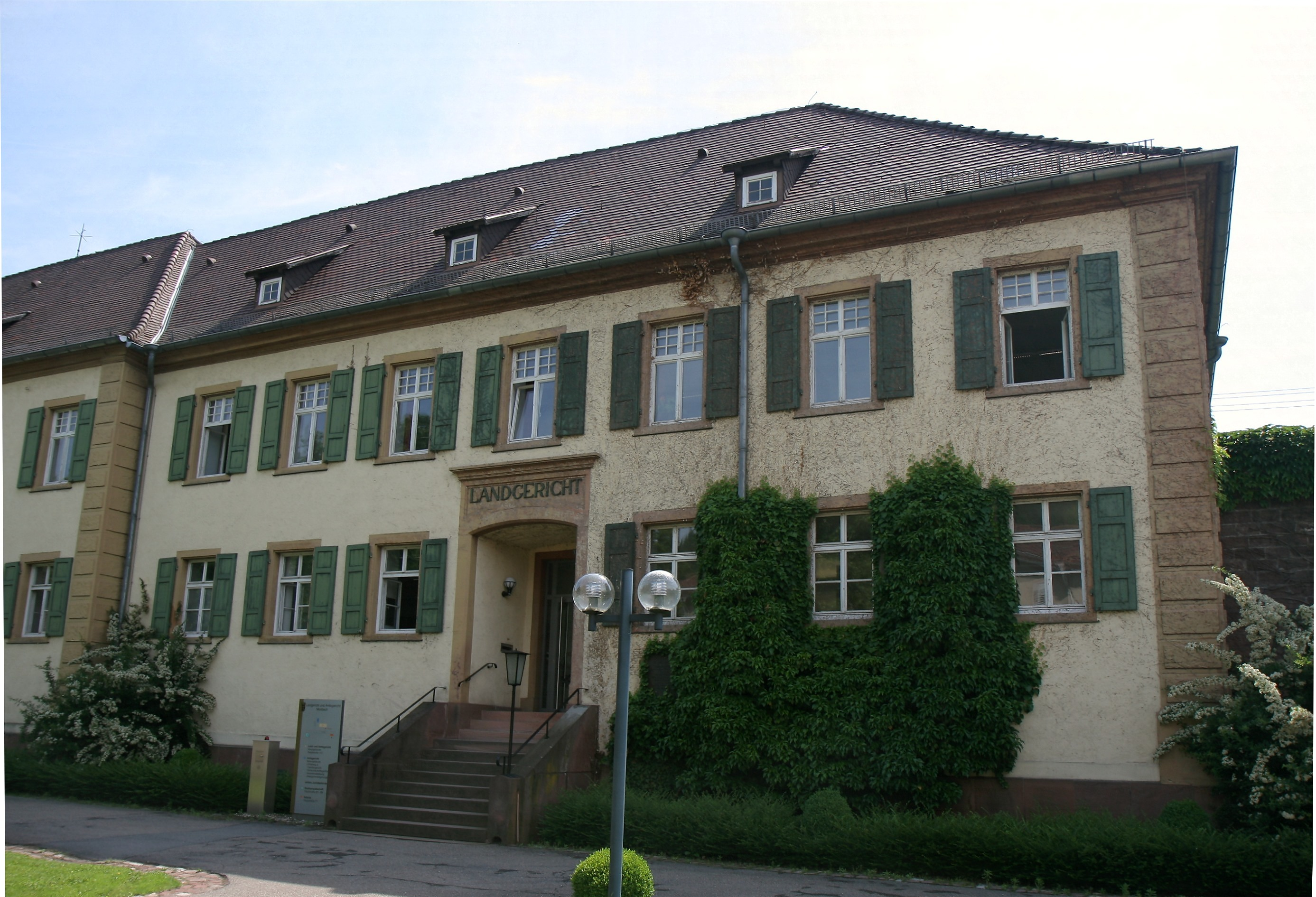 Gebäude des Landgerichts Mosbach in Mosbach.